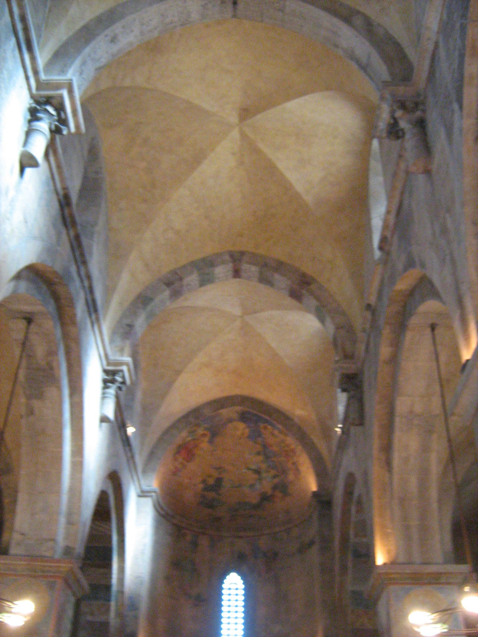 פנים הכנסייה הצלבנית במנזר הבנדיקטיני באבו גוש